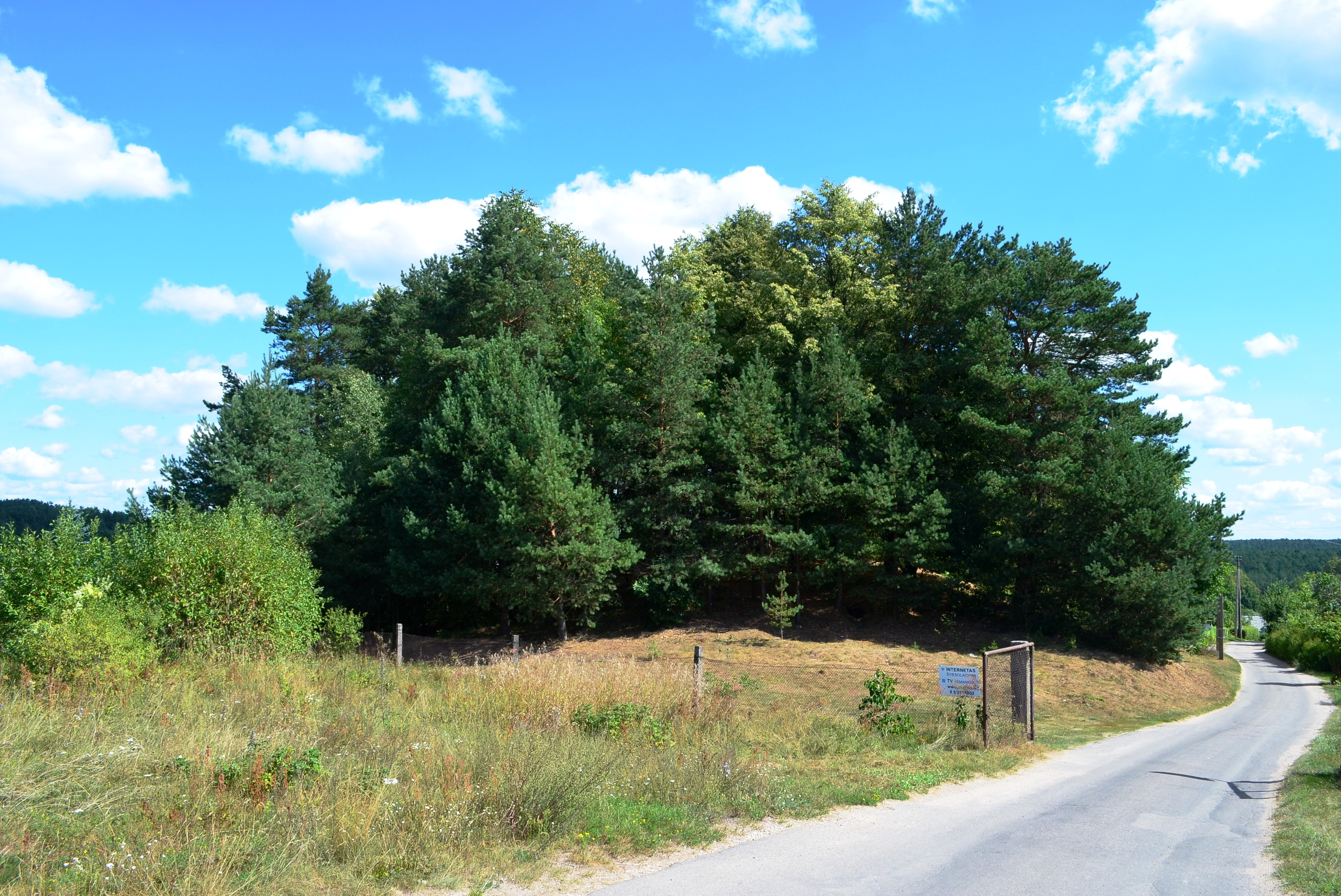 Naujanerių kapinaitės, Vilnius